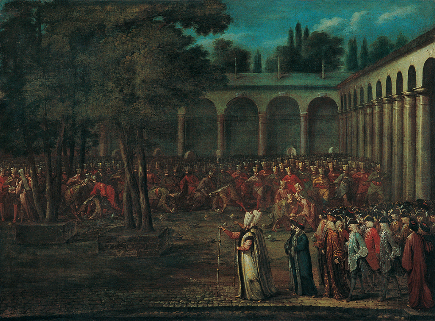 Yabancı elçilerin kabul törenleri, imparatorluğun gücünü göstermek amacıyla, üç ayda bir yeniçerilerin maaşlarının verildiği ‘ulufe’ gününe rastlatılır, elçi heyetinin Topkapı Sarayı’nın İkinci Avlu’sundan geçişi sırasında ulufelerini almış yeniçeriler, yere konmuş çanaklardaki yemekleri kapışırlardı. Dizinin ikinci resmi olan bu tabloda, sağda iki saray görevlisinin öncülüğünde avludan geçerken betimlenen elçi heyeti, ‘çanak yağması’ adı verilen bu olaya tanık olmaktadır.